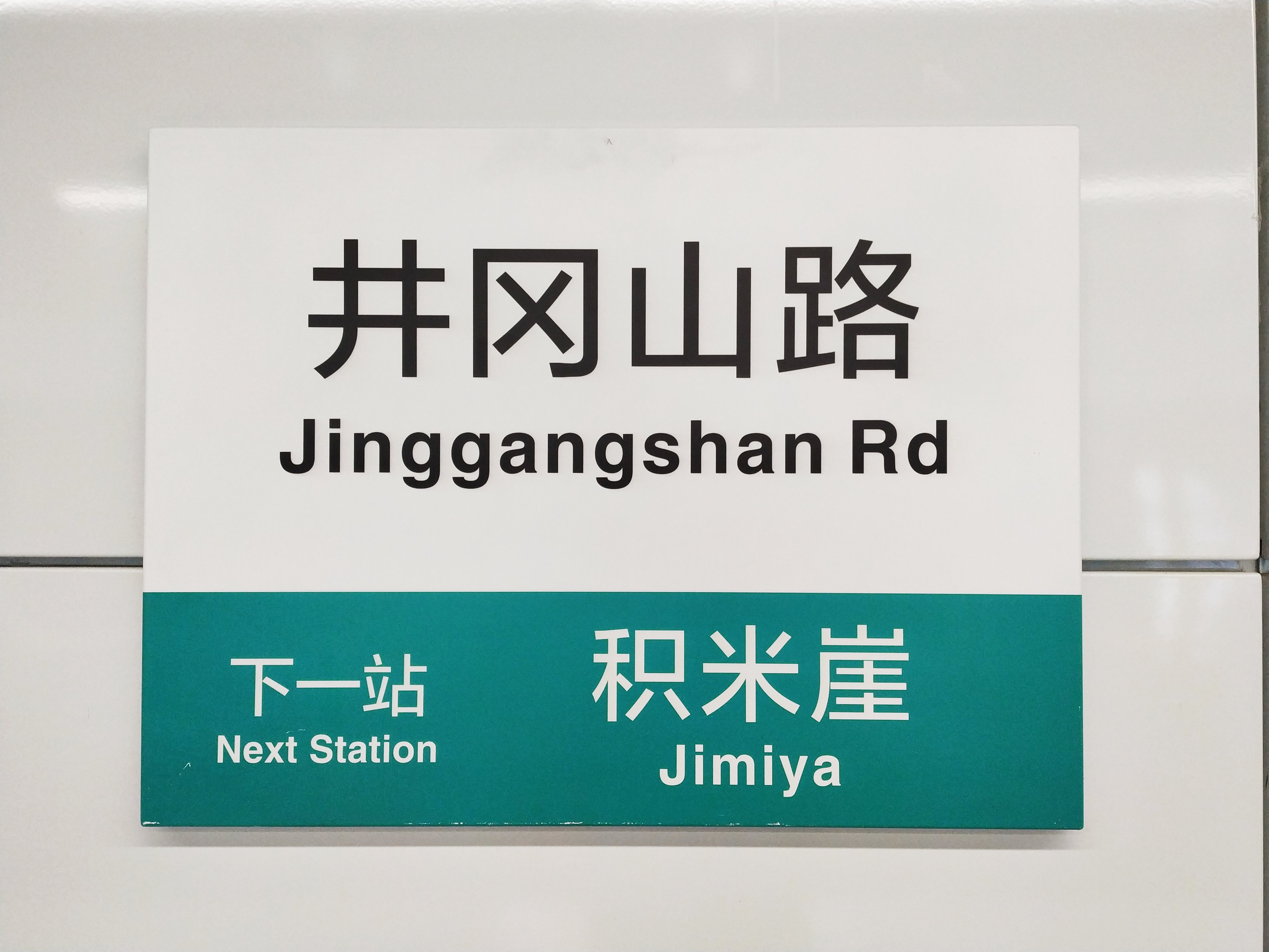 井冈山路站站牌